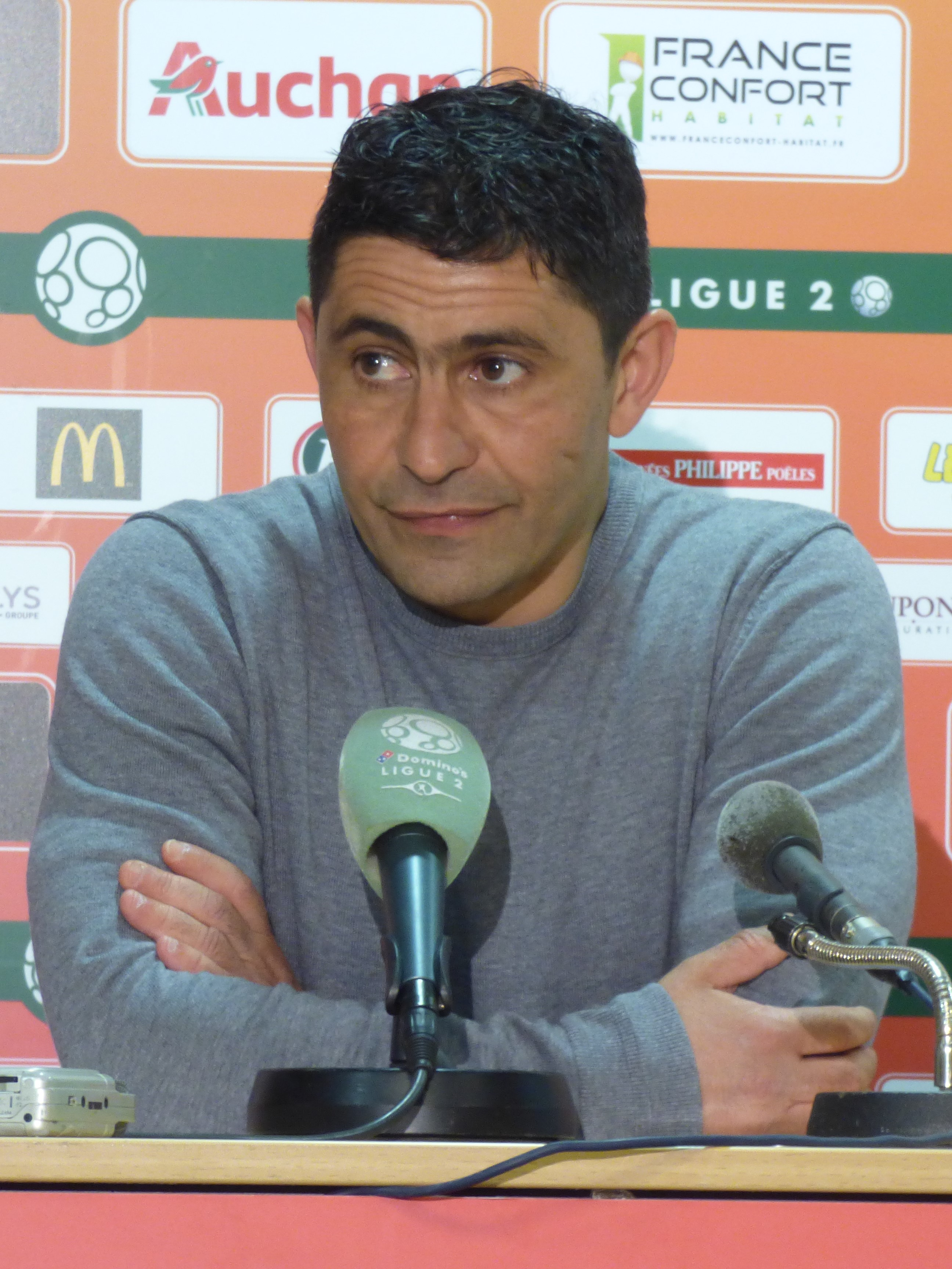 Oswald Tanchot après le match Lens / Le Havre, comptant pour la 30ème journée du championnat de France de Ligue 2 2018-2019, le 1er avril 2019 au Stade Bollaert-Delelis.